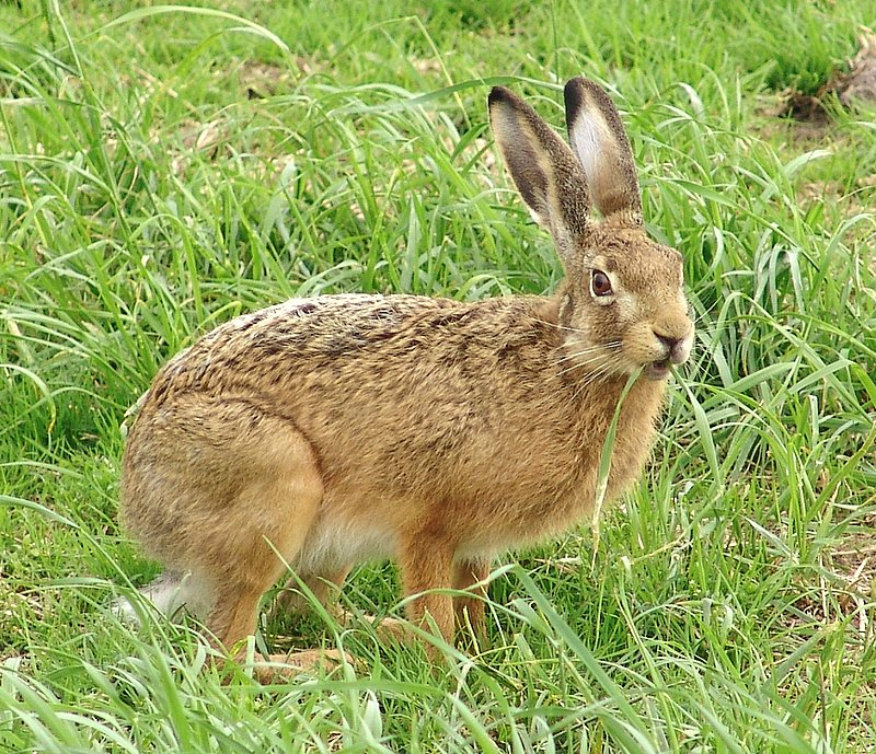 Feldhase (Lepus europaeus) auf Schiermonnikoog, Niederlande